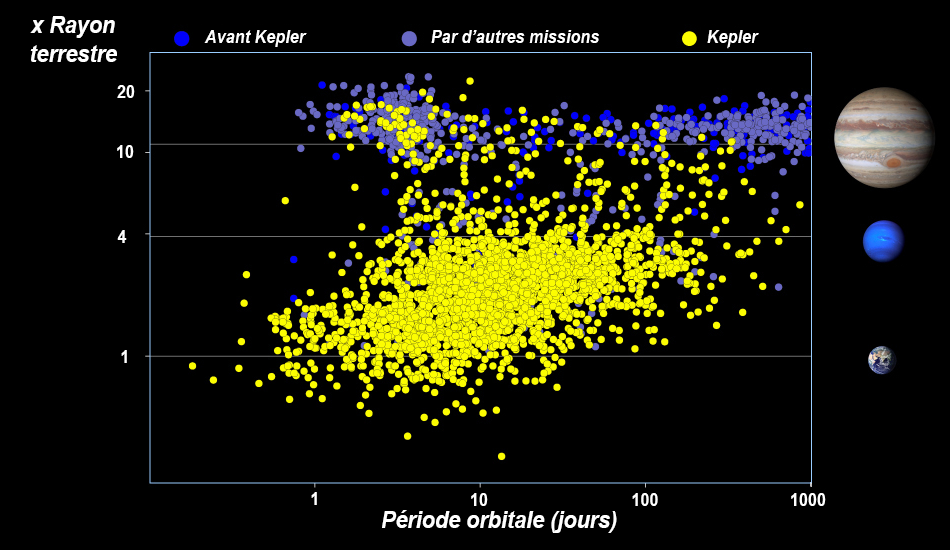 french labels : Today, as shown in figure 10, we know of over 3,500 confirmed exoplanets, with more than 2,500 of those found in the Kepler data. These planets range in size from larger than Jupiter to smaller than Earth. In just a couple decades, thanks largely to Kepler, we have gone from suspecting exoplanets existed to knowing that there are more exoplanets than stars in our galaxy.